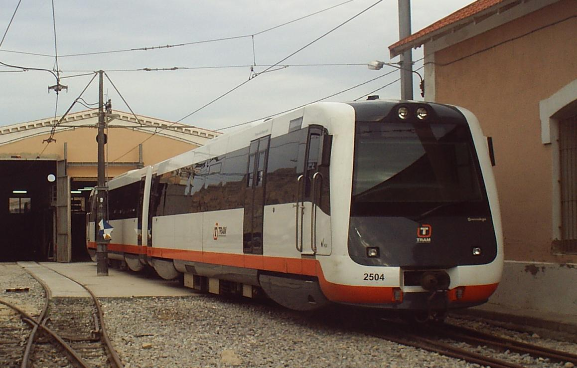 Automotor MAN (serie 2500) en las instalaciones de La Marina.